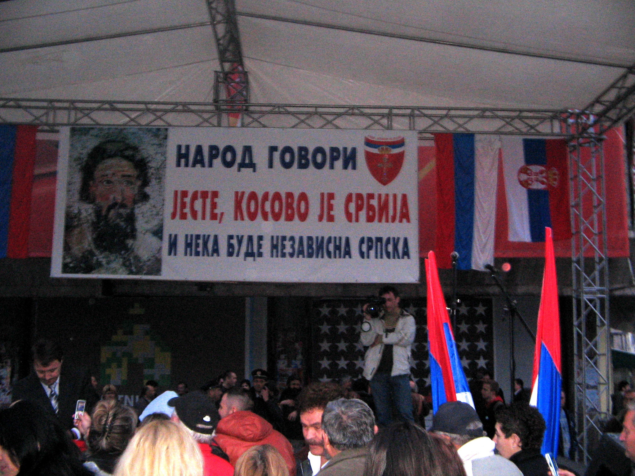 Protest u Banja Luci protiv proglašenja nezavisnosti Kosova.